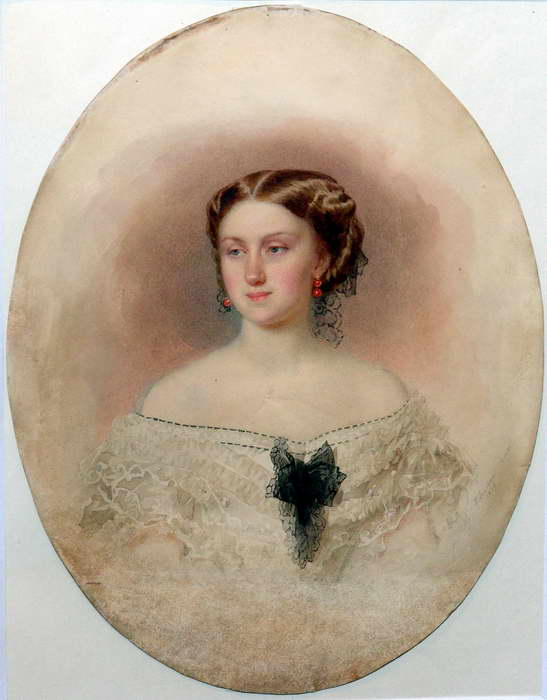 Вера Ивановна Опочинина, ур.Скобелева (1825- после 1892), фрейлина, дочь генерала И.Н.Скобелева, с 1840 года жена К.Ф. Опочинина (1808-1848).